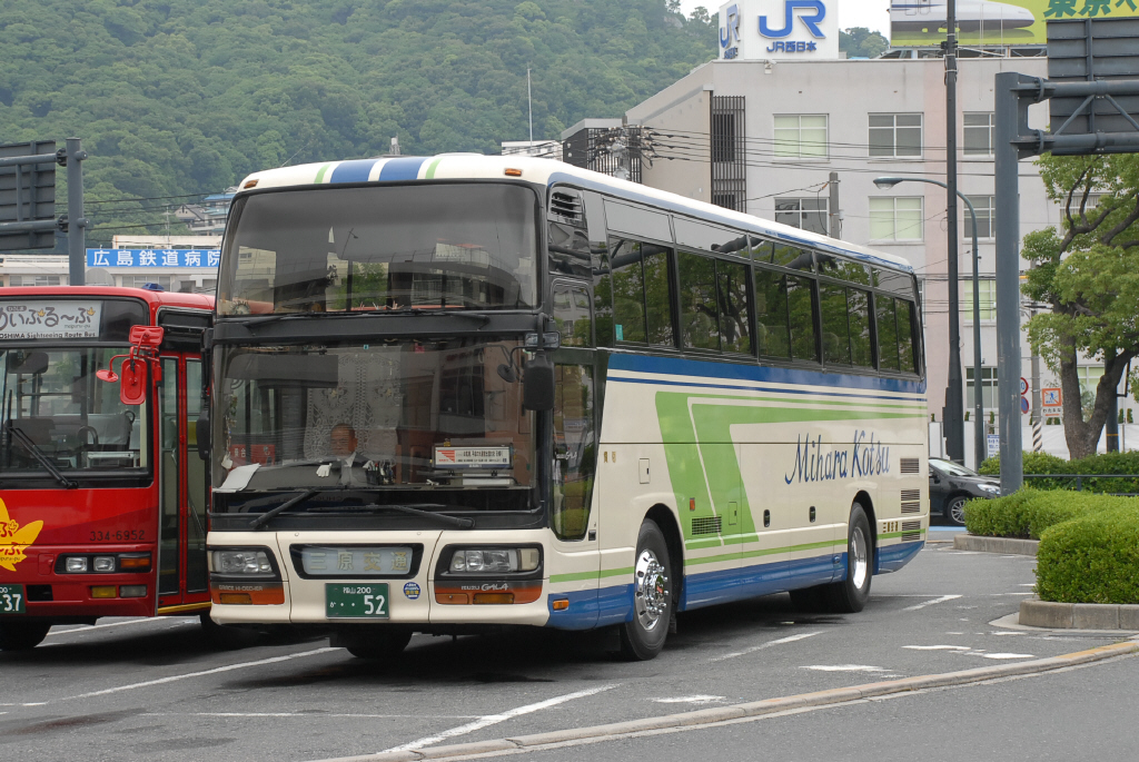 広島駅新幹線口にて 2013-6-23撮影